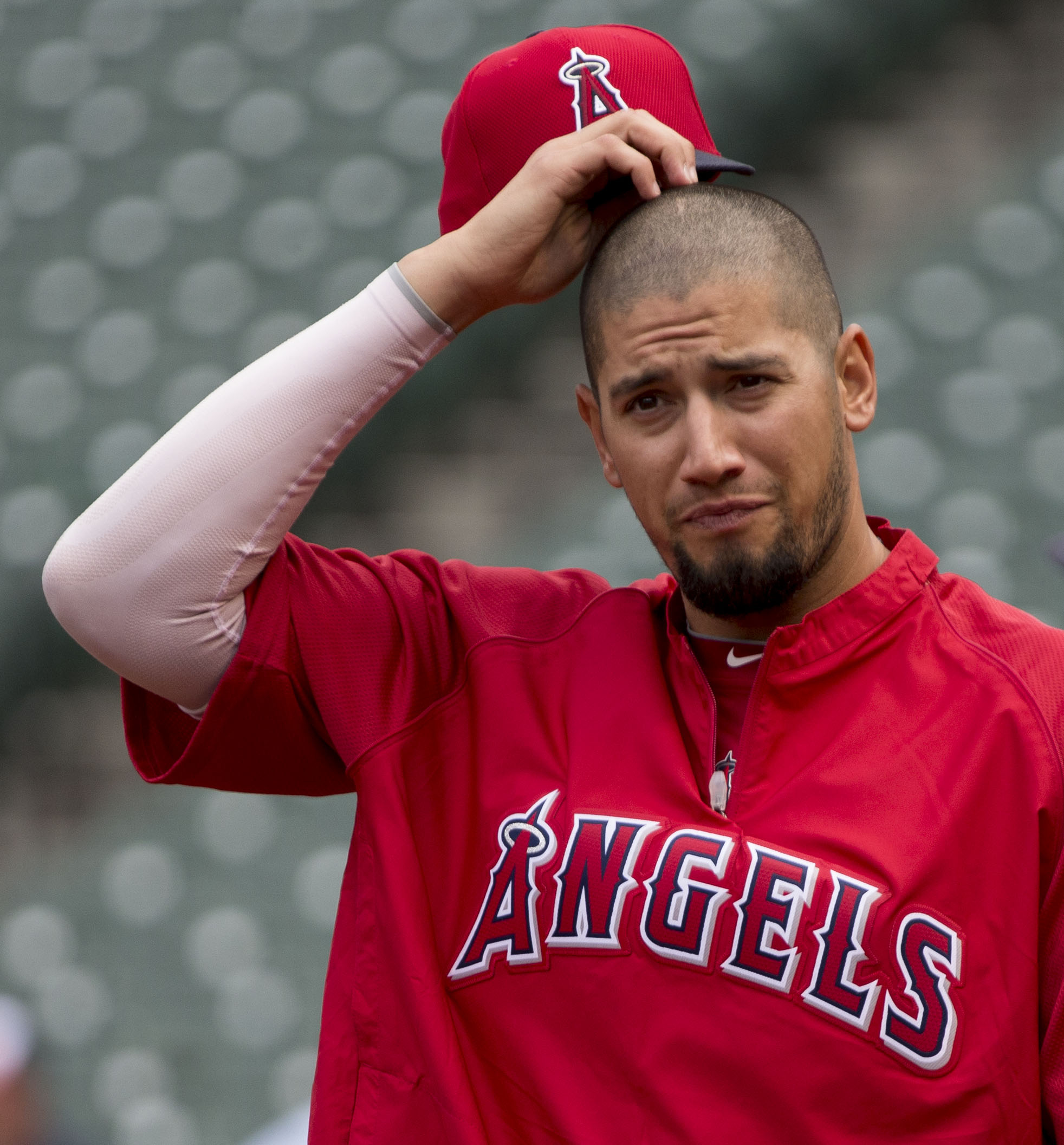 Dane De La Rosa